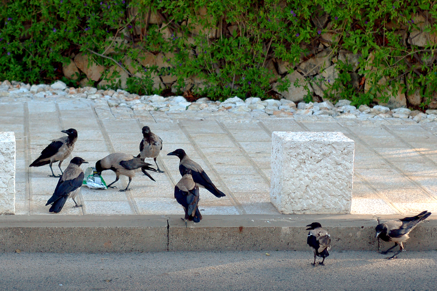 see title